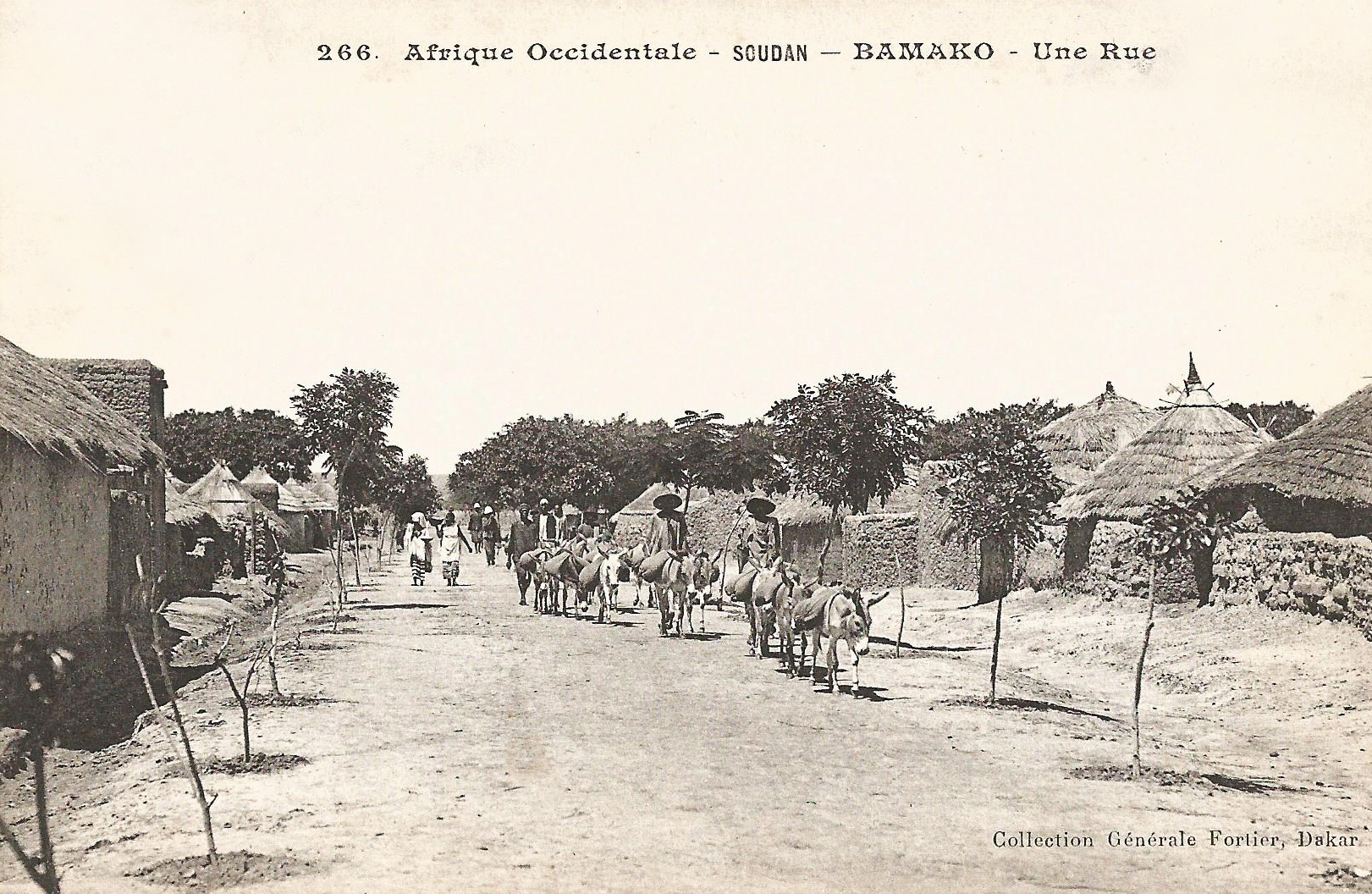 François-Edmond Fortier, Bamako. Une rue. Afrique Occidentale - Soudan.